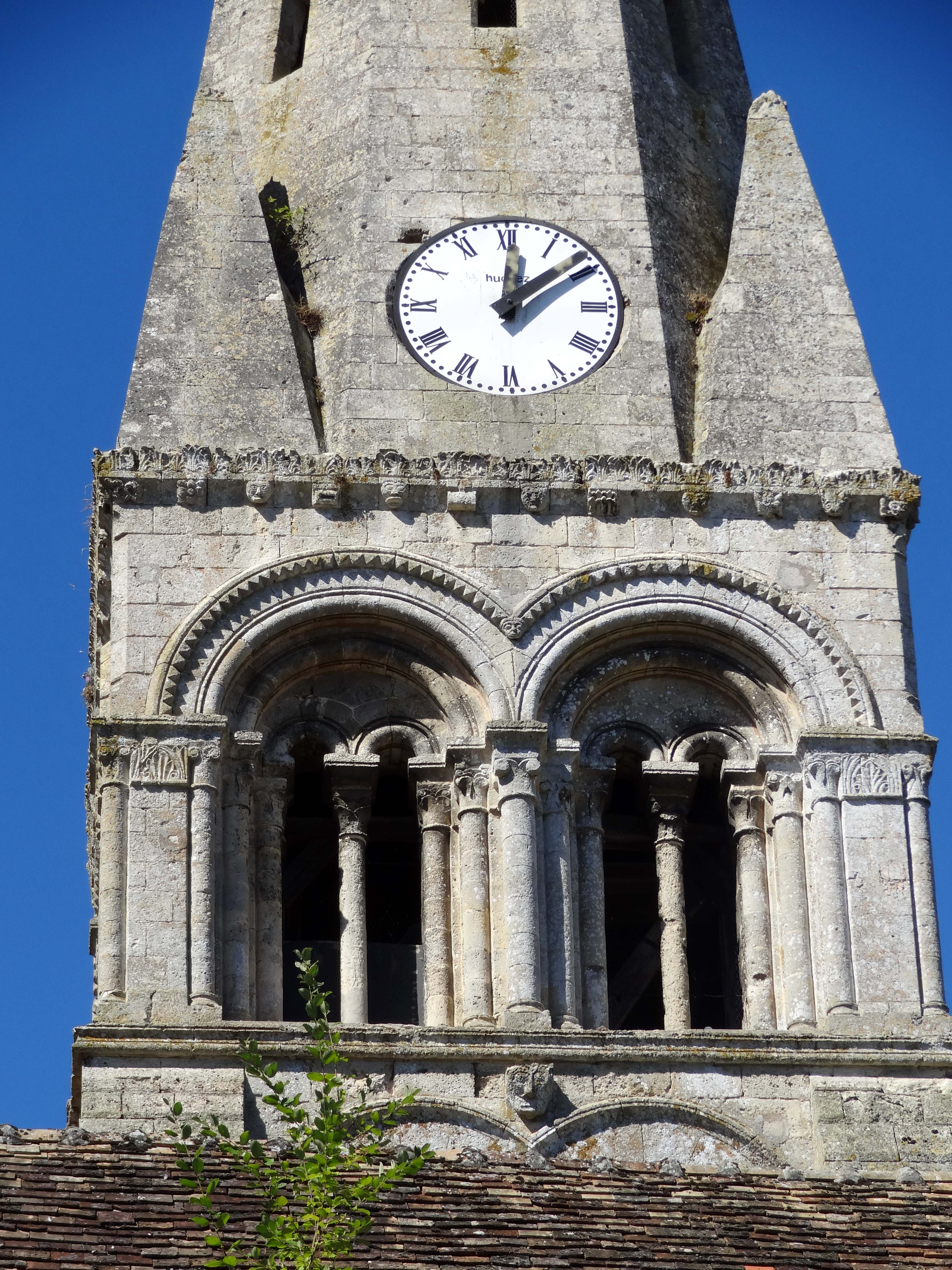 Église Sainte-Geneviève de Marolles - voir titre.